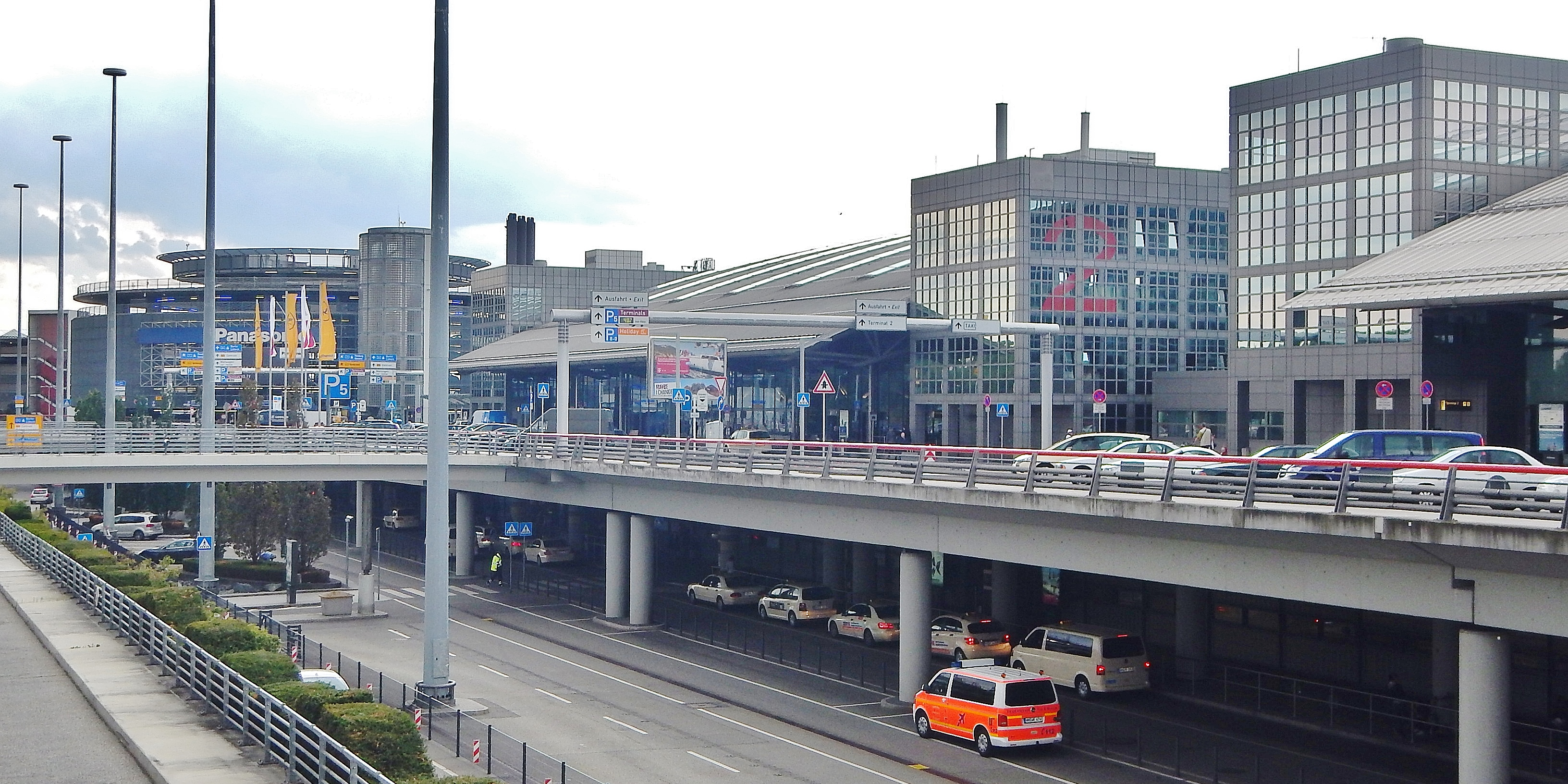 Flughafen Hamburg (HAM)